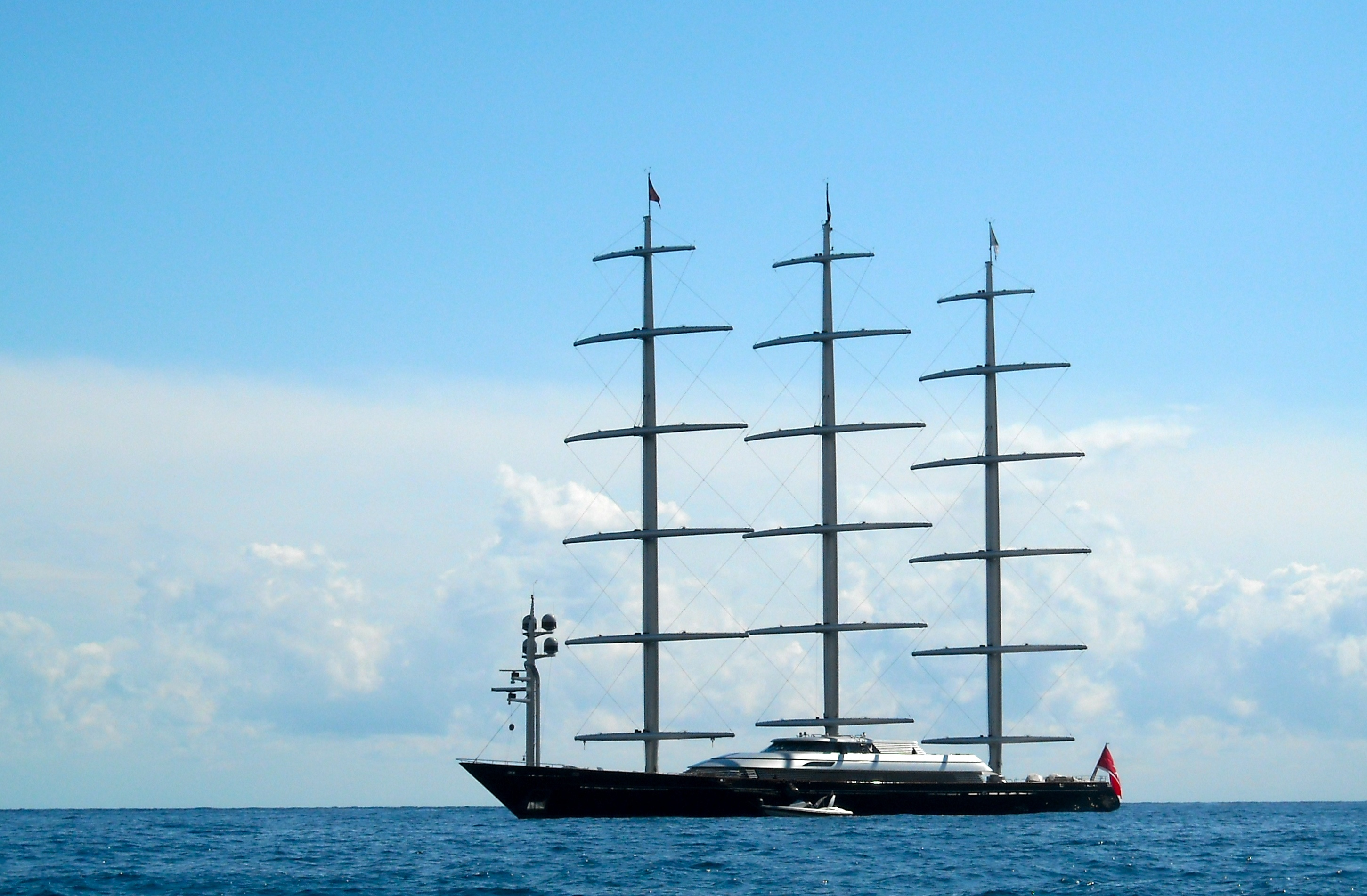 Maltese Falcon sailboat - 2